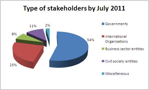 type de membres de la base de donnée du wsis stocktaking